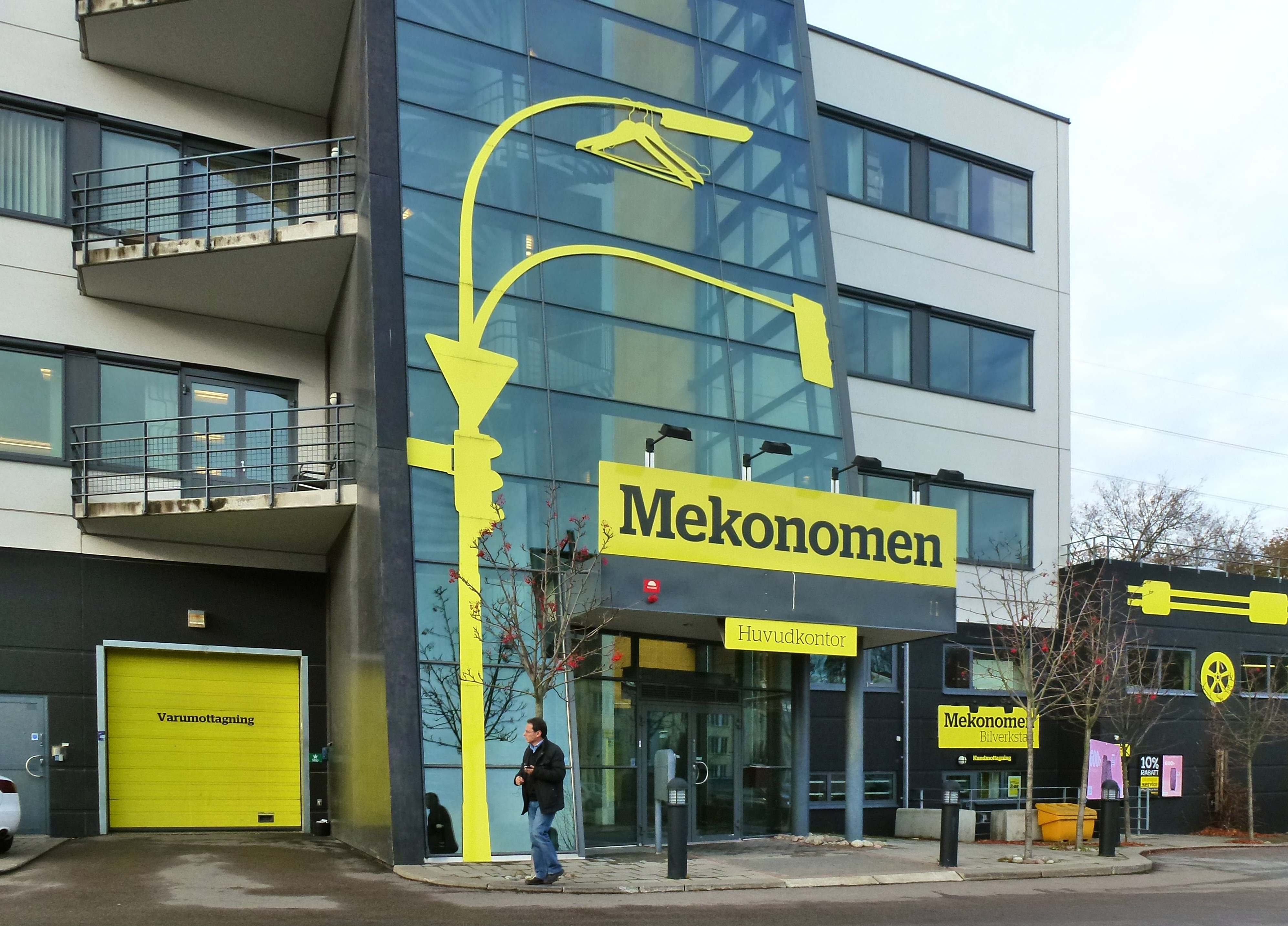 Mekonomens huvudkontor i Segeltorp